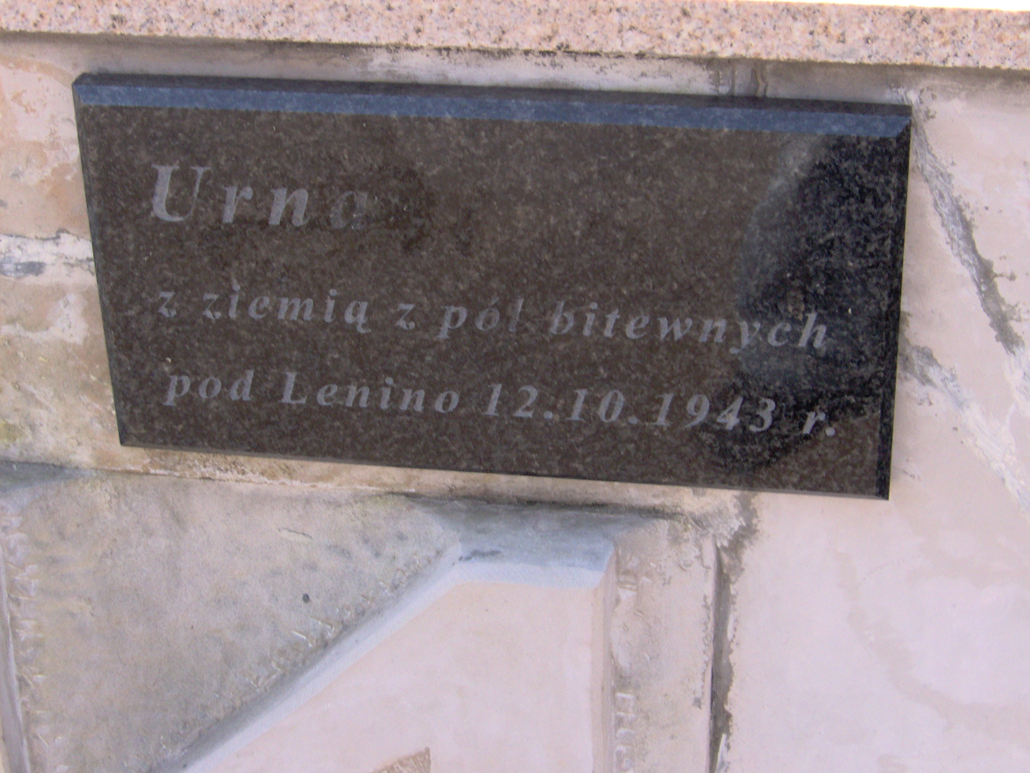 Tablica przy Pomniku Sapera przy ul. Żytniej 69 (2007 r.)